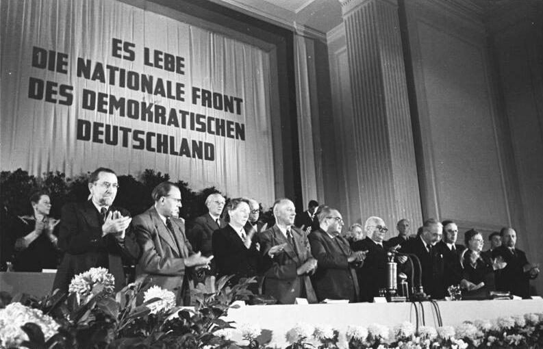 ADN-ZB/Kolbe Berlin: Gründung der DDR am 7.10.1949 Im Gebäude der DWK (Deutsche Wirtschaftskommission) in der Leipziger Straße fand am 7.10.1949 die 9. Tagung des Deutschen Volksrates statt, auf der das Manifest der Nationalen Front des demokratischen Deutschland verkündet wurde. Der Deutsche Volksrat wurde zur Provisorischen Volkskammer umgebildet und die Deutsche Demokratische Republik gegründet. Im Präsidium von l.n.r.: Bernhard Koenen, Otto Grotewohl, Magdalene Stark-Wintersig, Ernst Goldenbaum, Hermann Kastner, Wilhelm Pieck, Otto Nuschke, Lothar Bolz, Wilhelmine Schirmer-Pröscher, Walter Ulbricht.